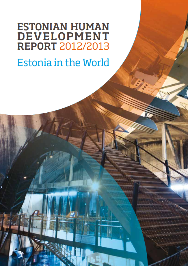 Eesti inimarengu aruanne 2012/2013 "Eesti maailmas" esikaas